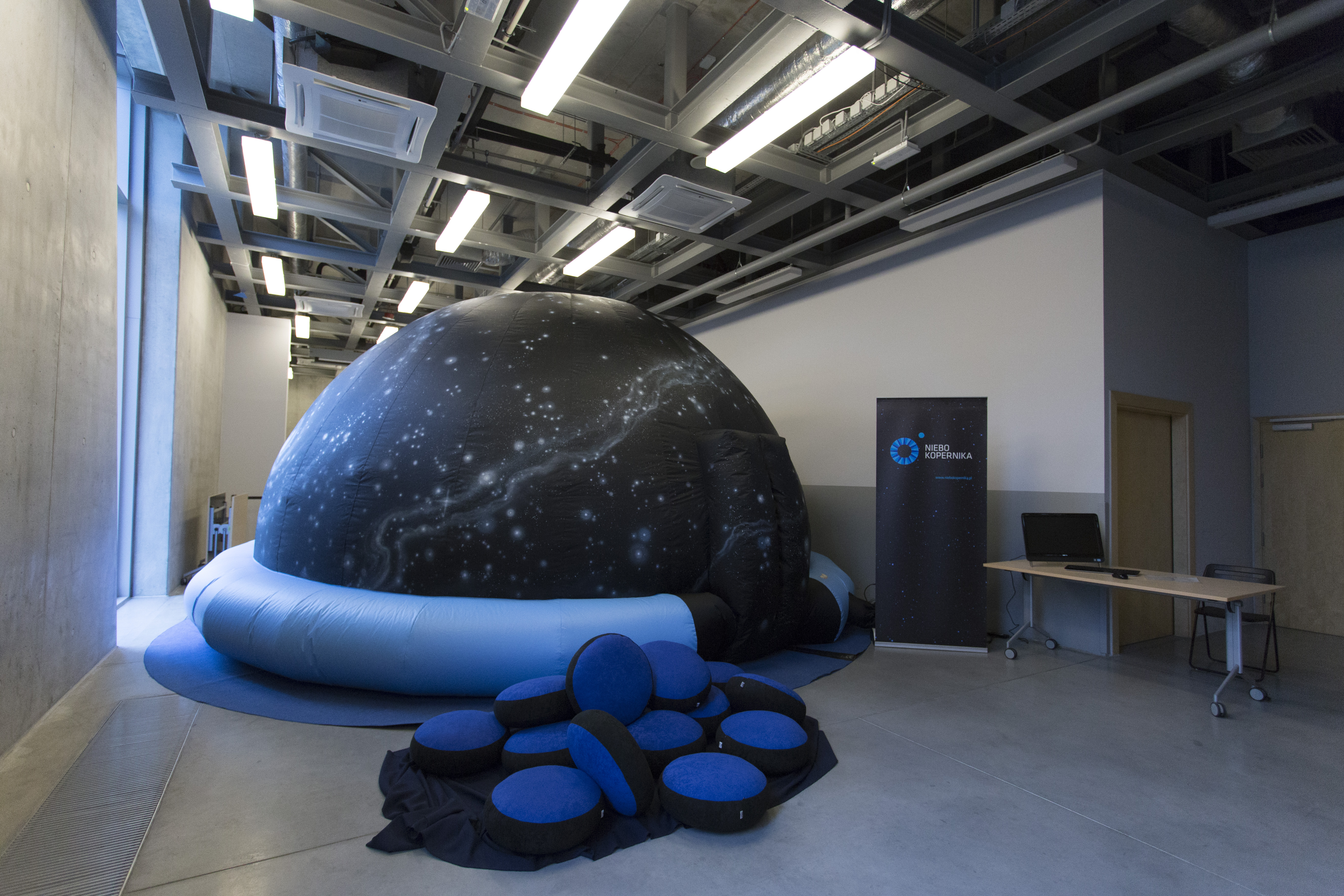 Kopuła mobilnego planetarium, jeżdżącego tzw. Planetobusem w ramach projektu Nauka dla Ciebie, koordynowanego przez Centrum Nauki Kopernik w Warszawie.